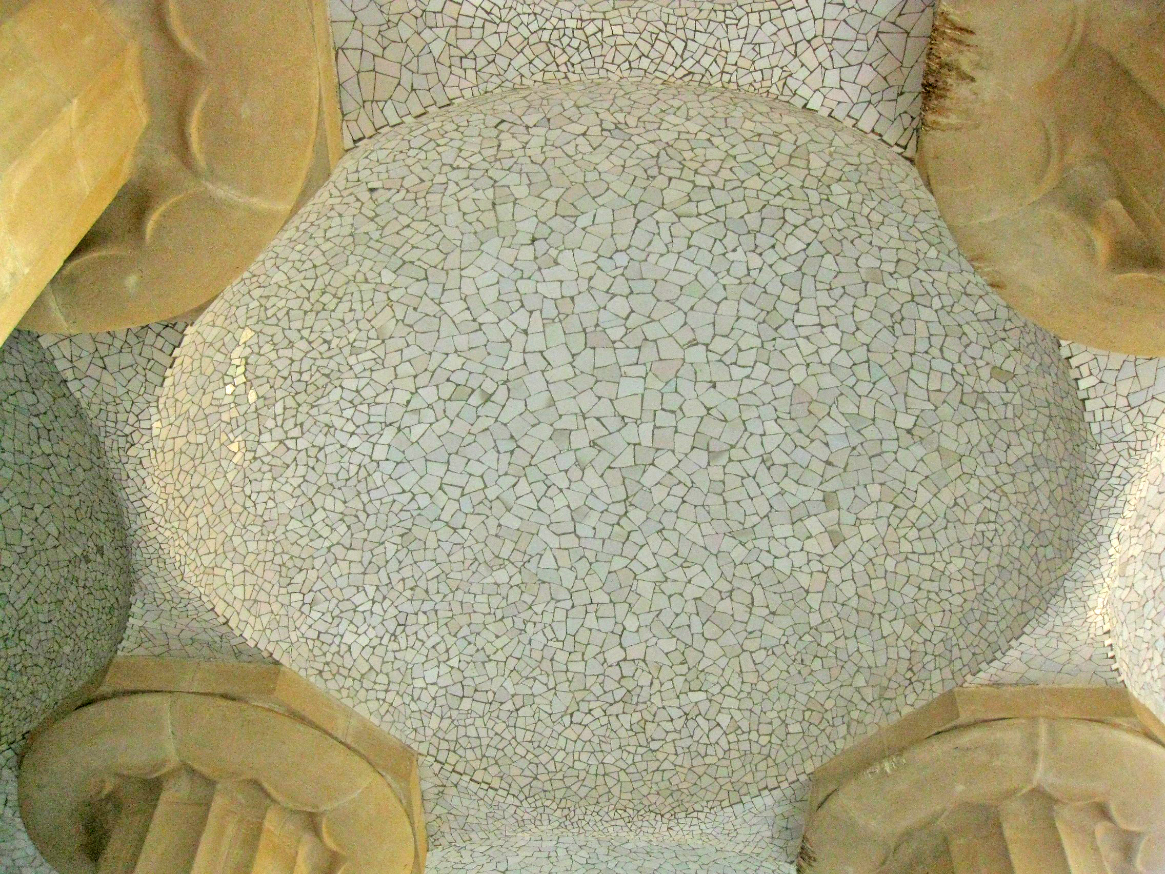 Detall del sostre de trencadís blanc de la Sala Hipòstila del Parc Güell (Barcelona)